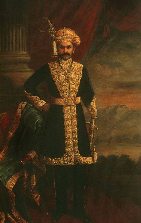 Portrait of HH Sri Chamarajendra Wadiyar X